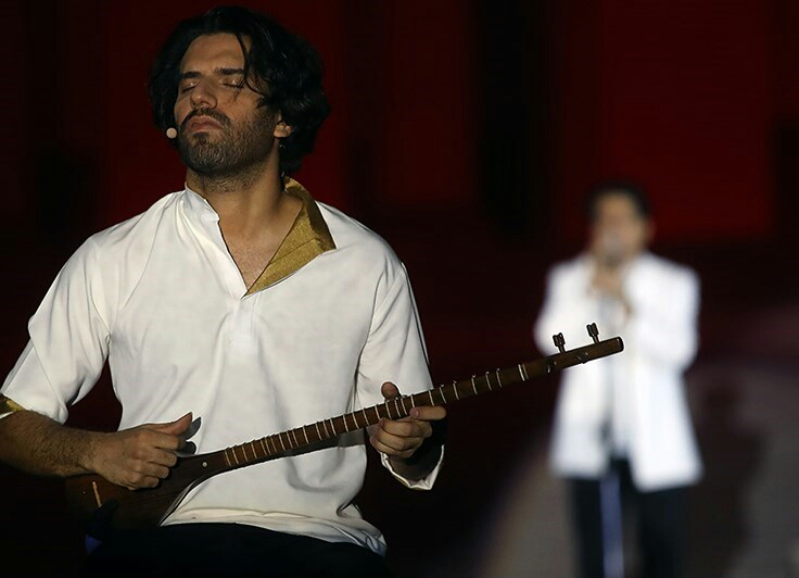 کنسرت نمایش سی - مرداد ۱۳۹۶